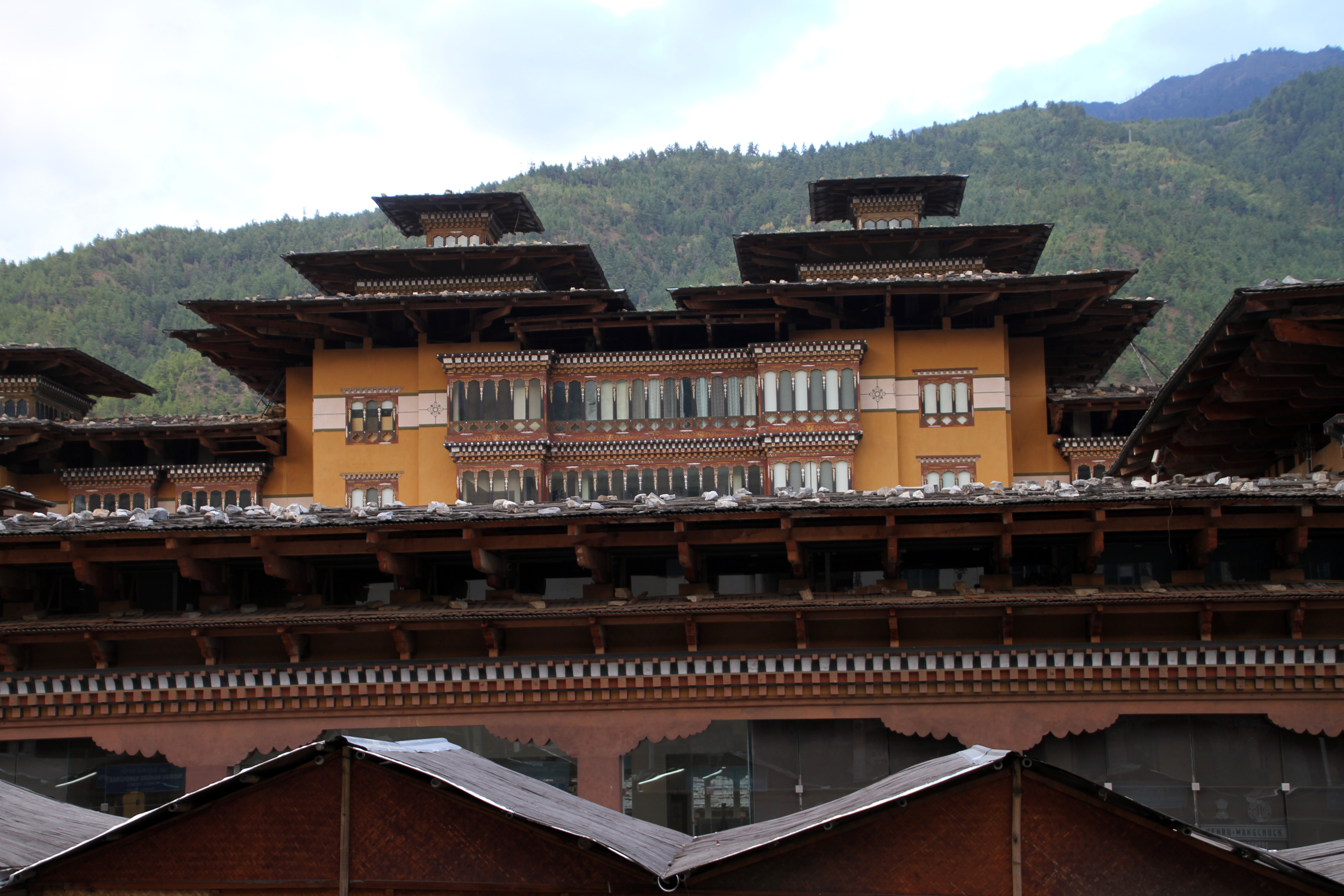 Norzin Lam (Thimphu city)